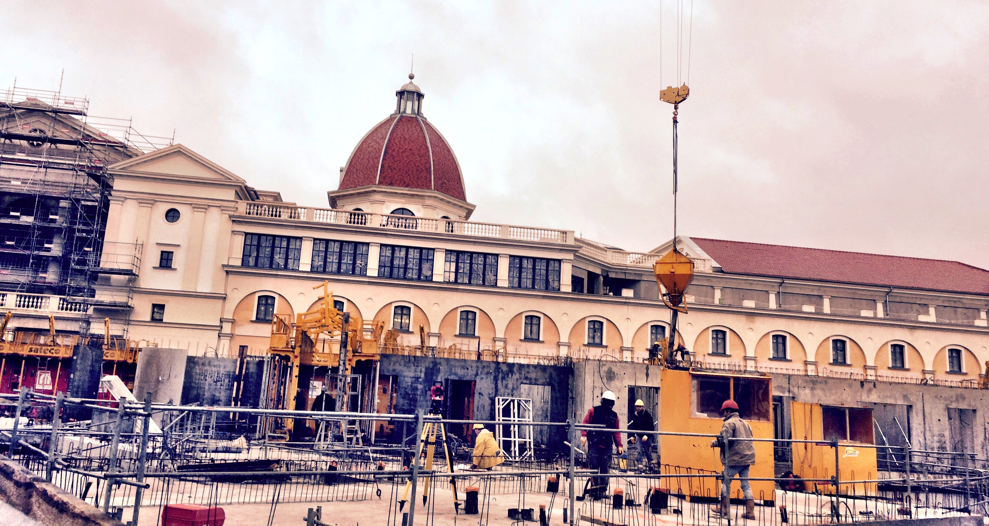 Vue du pôle culturel du Plessis-Robinson en construction Vue du côté du cinéma Gérard Philippe Construction également d'un immeuble devant